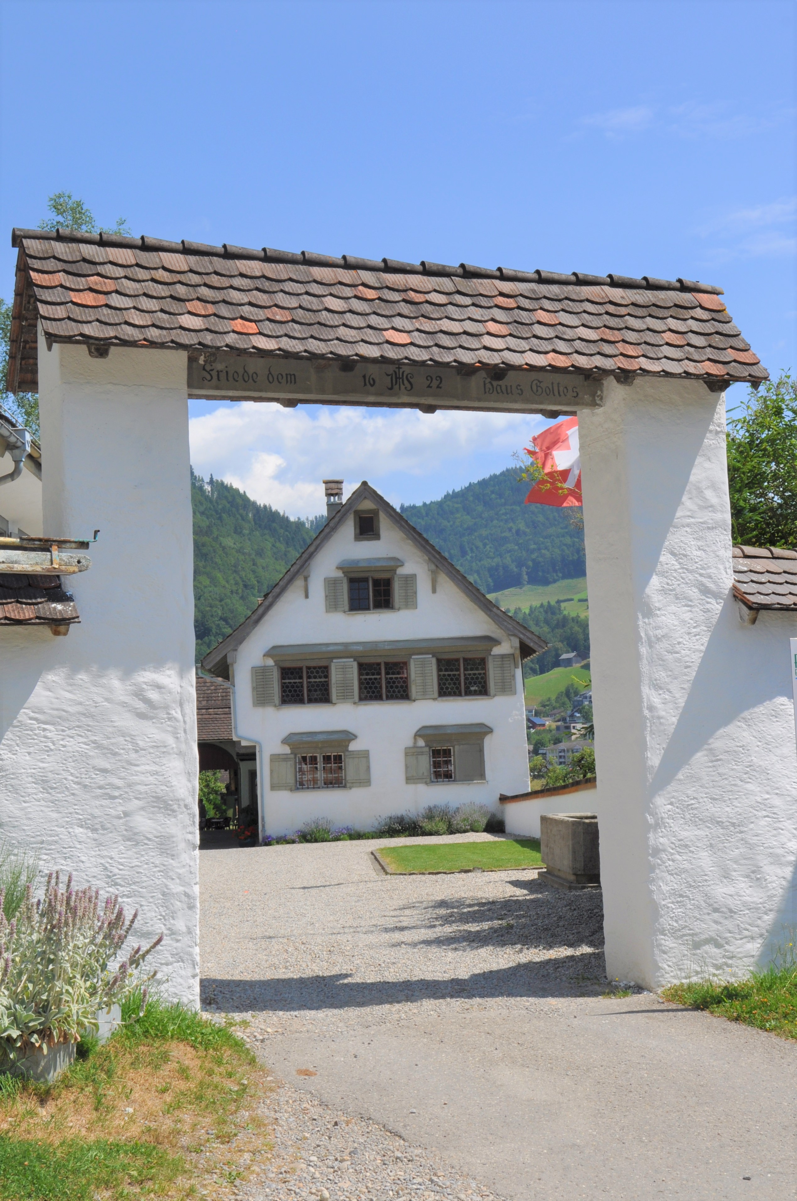 Eingangstor mit Pförtner- und Gästehaus